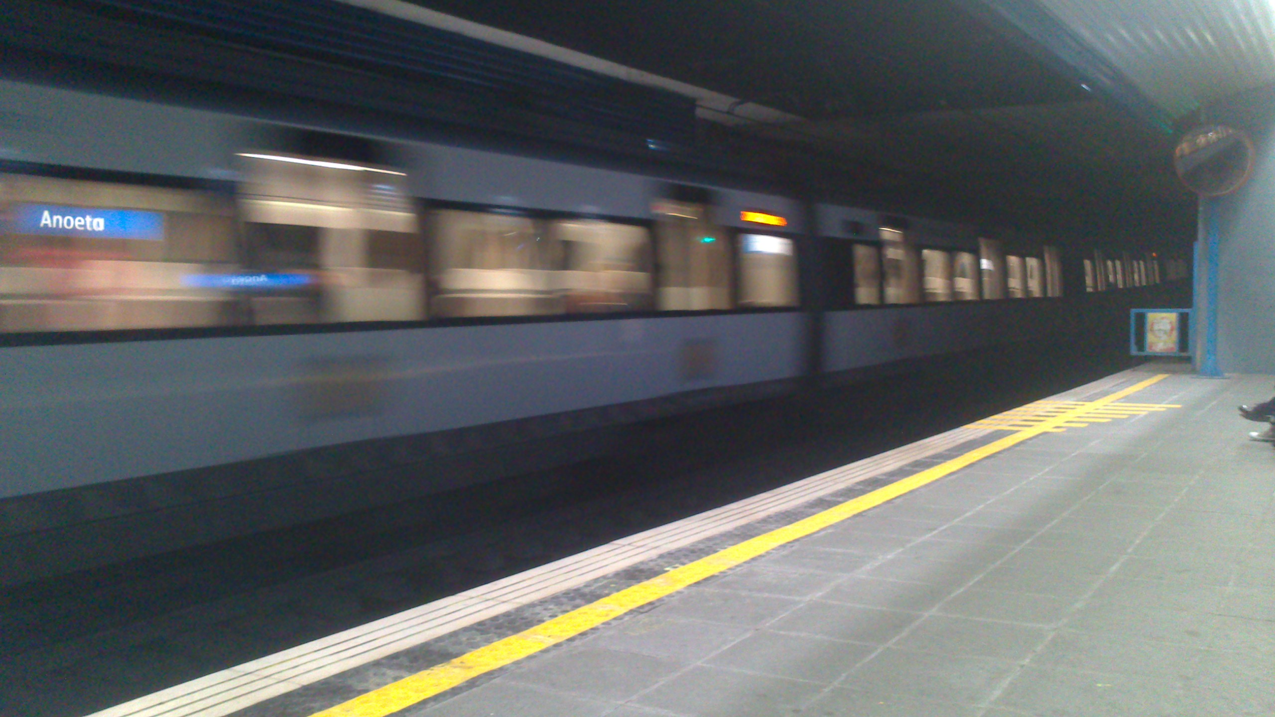 Tren entrando a Anoeta hacia Amara